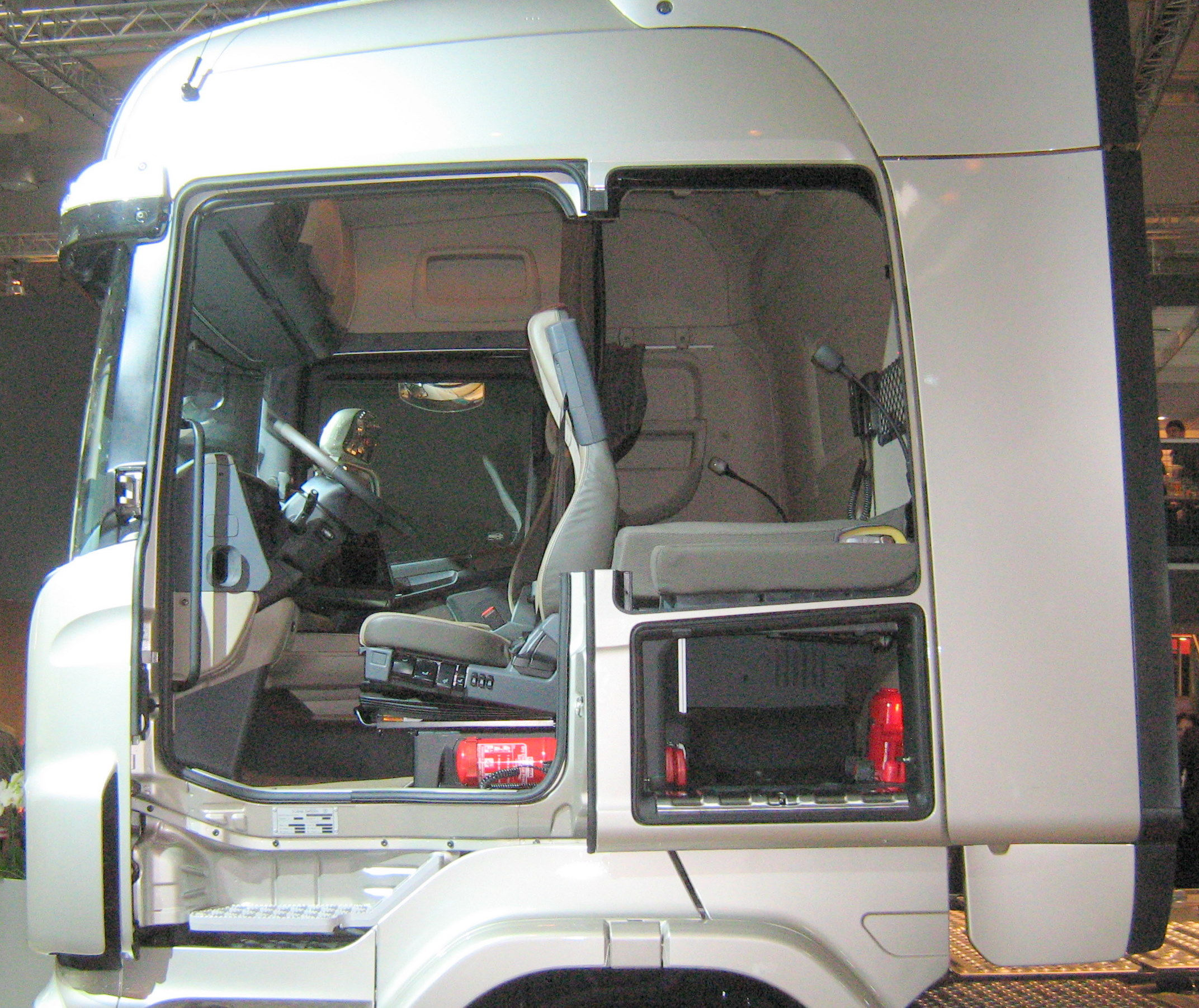 LKW-Fahrerhaus von Scania in der IAA Ausstellung 2010.